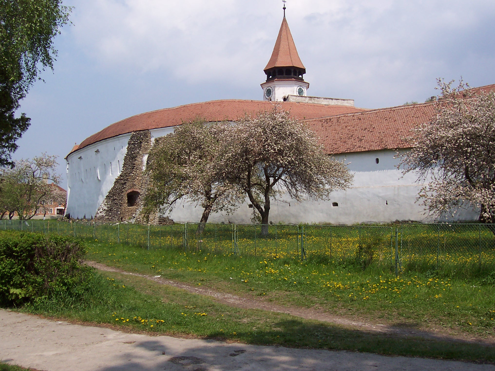 Kirchenburg Tartlau